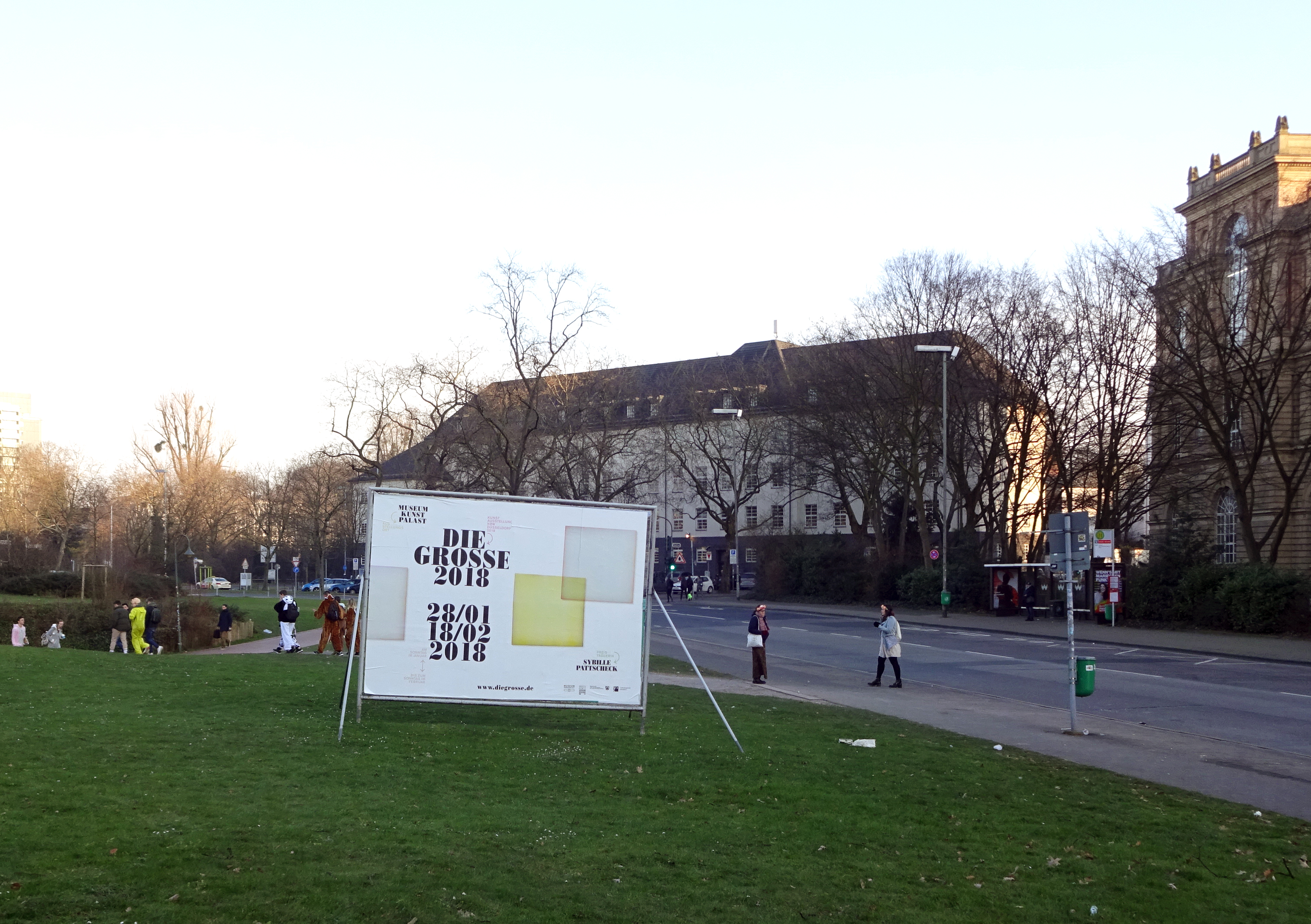 Fritz-Roeber-Straße in Düsseldorf mit Wiese der Hofgartenrampe und Plakat "Die Grosse", im Hintergrund das Phoenix-Haus, rechts die Akadamie, an Altweiber im Februar 2018